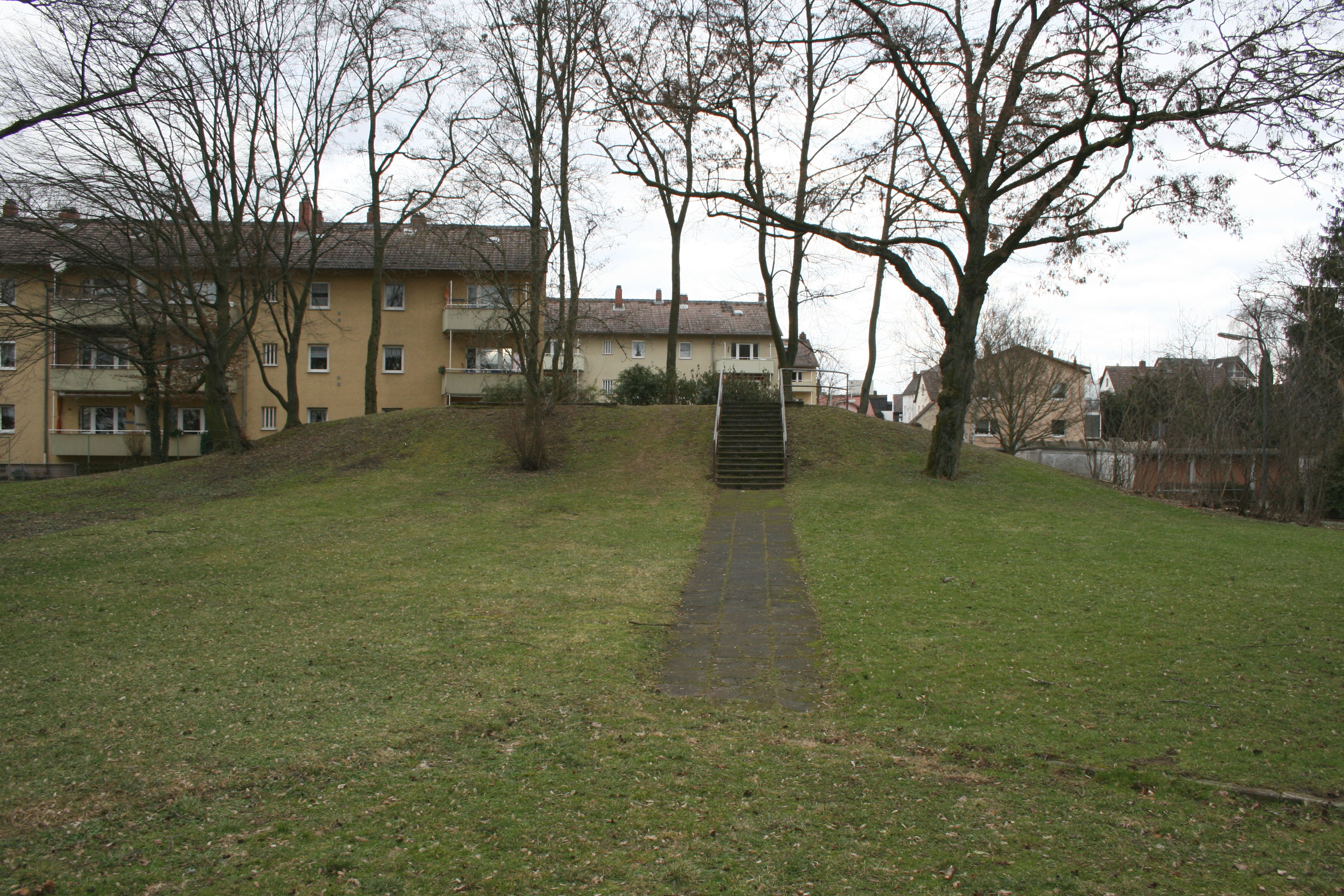 Burg Bachberg, vermutliche Turmhügelburg in Frankfurt a.M.-Preungesheim. Ansicht des Hügels von Westen.